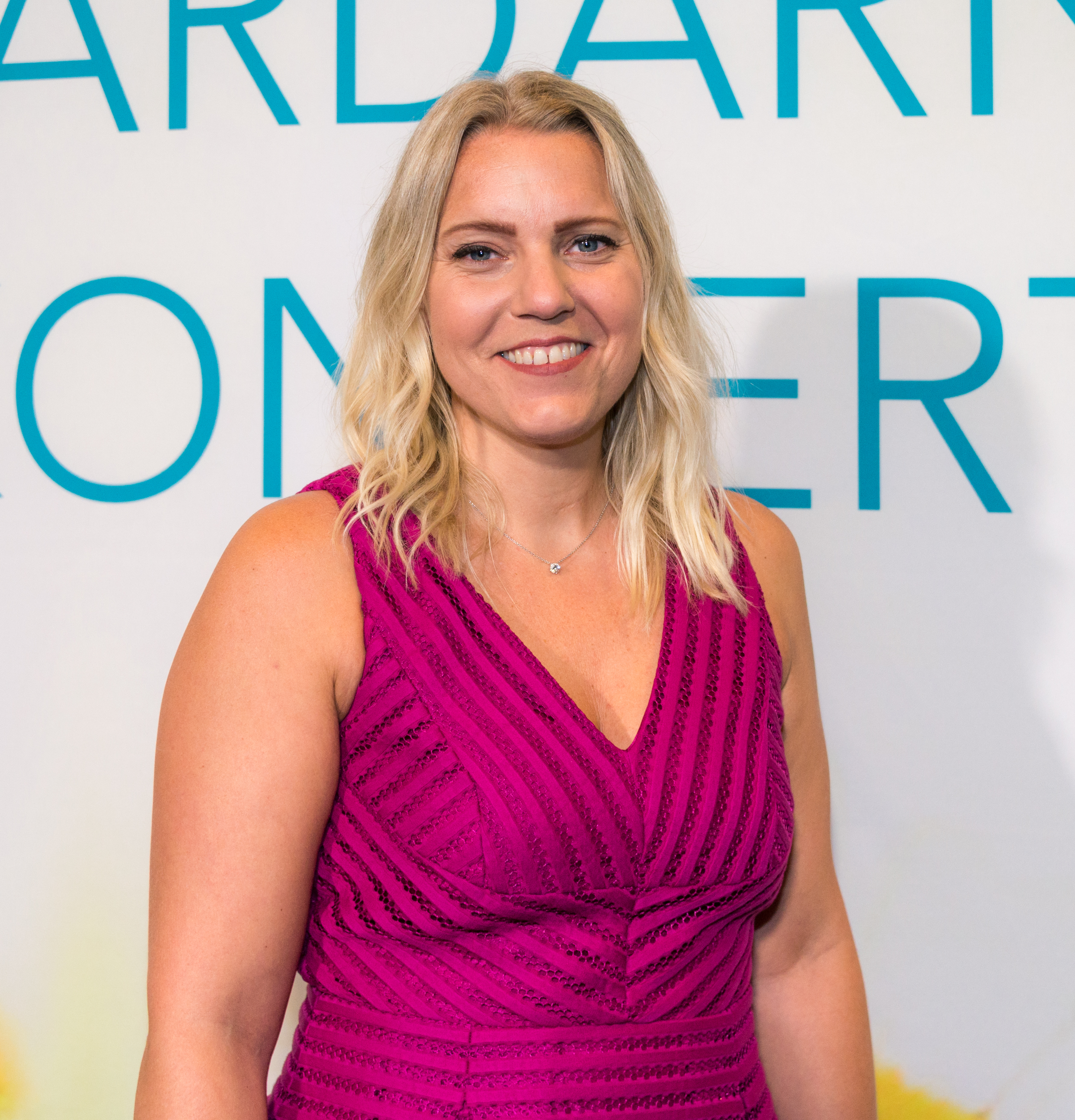 Carina Bergfeldt, Sommarvärd i P1, på röda mattan på väg in i Berwaldhallen i Stockholm den 13 juni 2019.